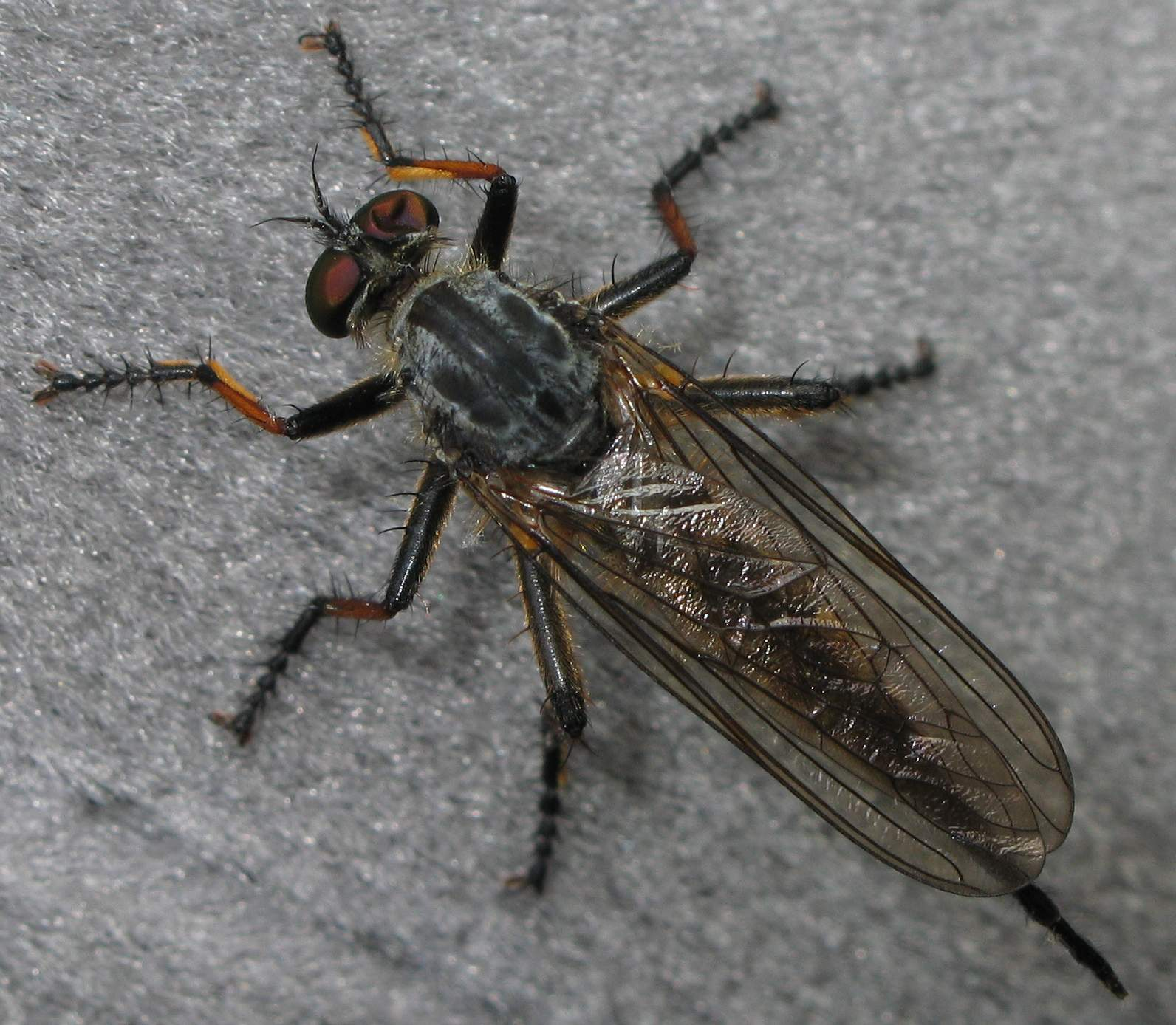 Gemeiner Strauchdieb (Neoitamus cf. cyanurus) Zur Bestimmung: Eine Unterscheidung von Weibchen von Neoitamus cyanurus und Neoitamus socius ist anhand von Fotos nicht zweifelsfrei möglich. Author: soebe Date: June 20, 2006 Location: Hamburg, Northern Germany Taken by Soebe in Northern Germany (Hamburg) and released under GNU FDL.